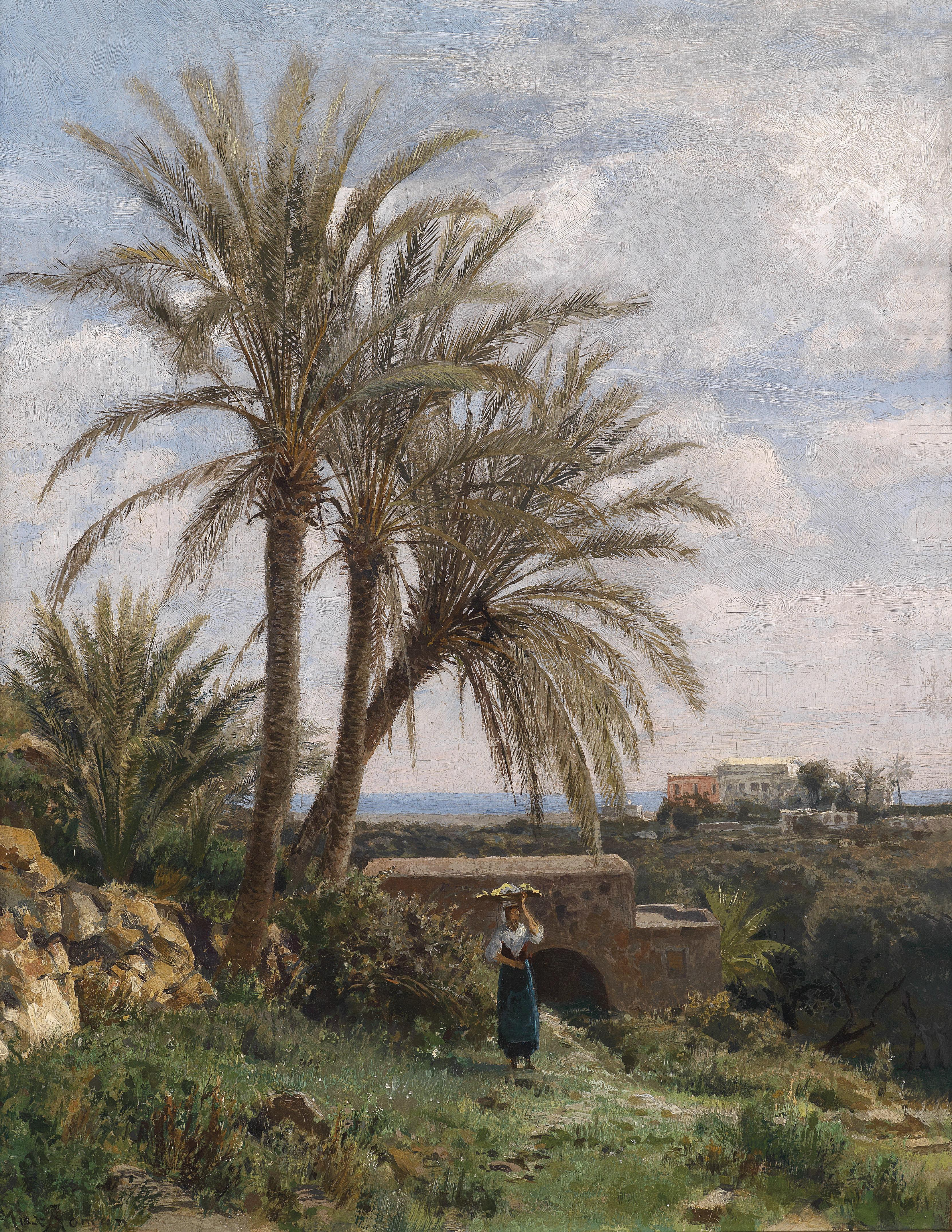 Antike Villa bei Tivoli, rückseitig auf Etikett des "Vereins bildender Künstler Karlsruhe" betitelt, signiert Max Roman, Öl auf Holz, 33 x 24,5 cm